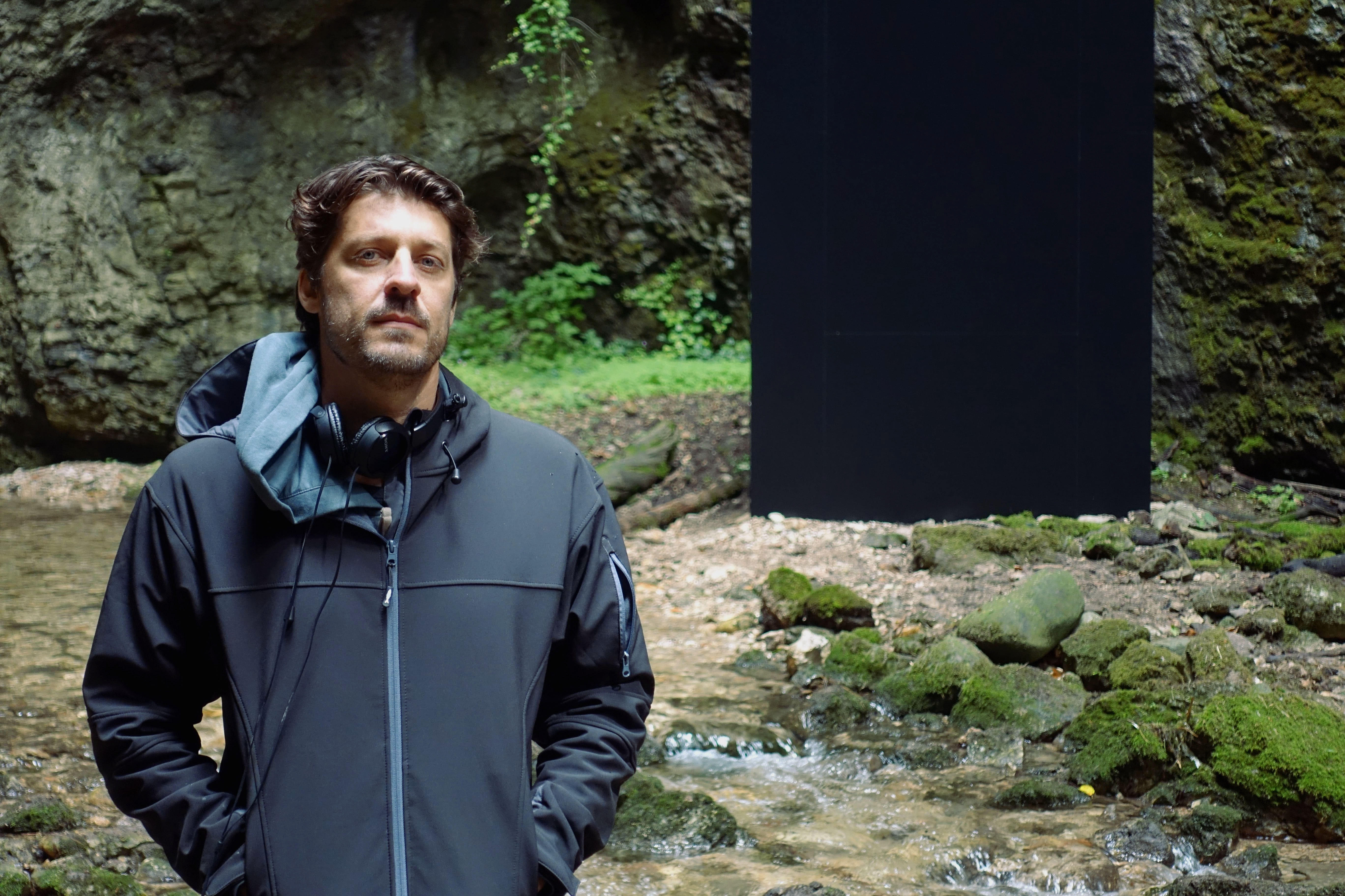 Jacopo Rondinelli sul set del film Ride.